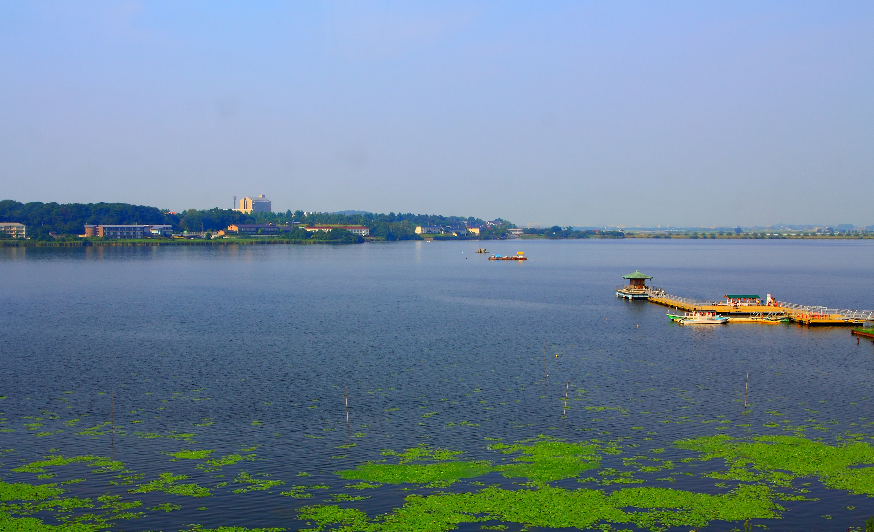 片山津温泉、柴山潟と浮御堂(石川県加賀市)